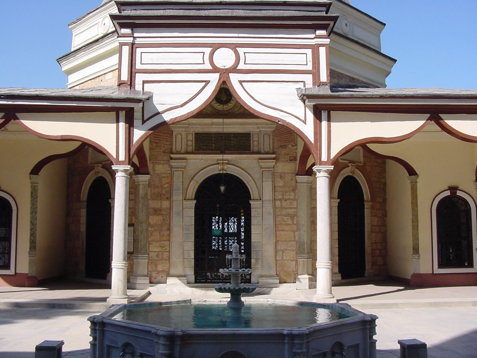 BURSA-EMİRSULTAN CAMİİ İÇİ